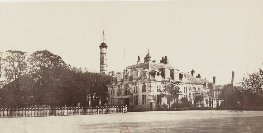 Lorient en 1866, Hotel Gabriel pavillon est.